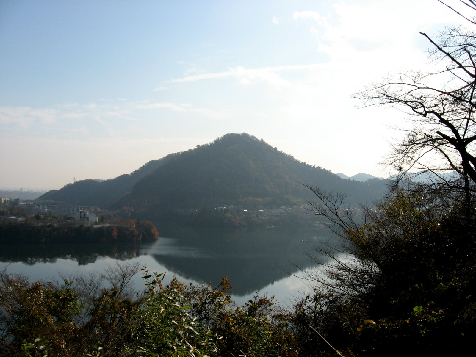 城山